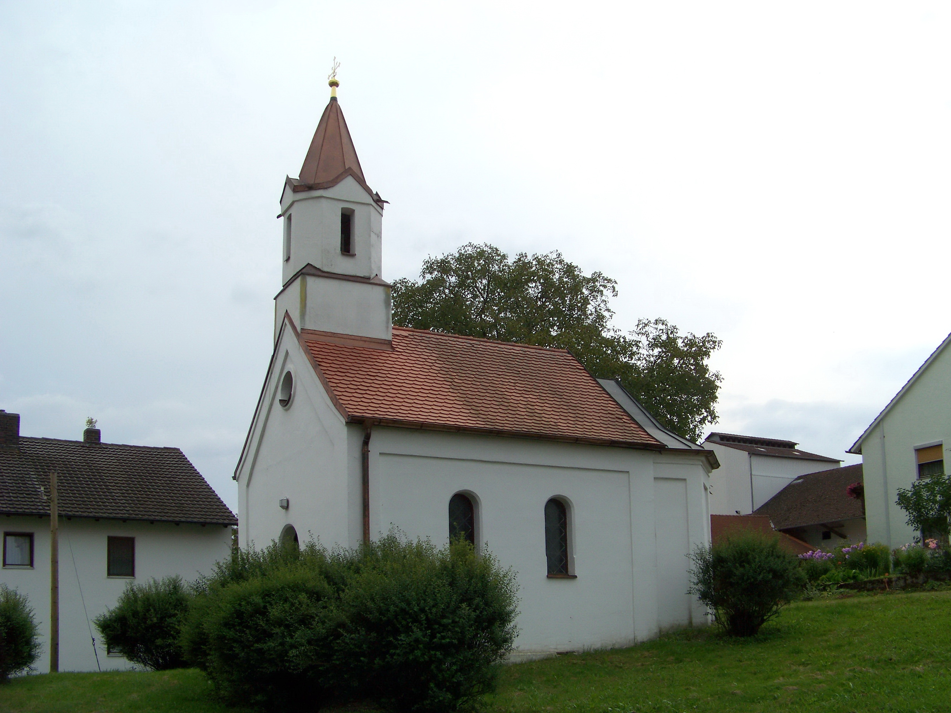 Aiglsbach, Radertshausen. Ortskapelle. Satteldachbau mit eingezogenem, fünfseitig geschlossenem Chor. Turmartiger Dachreiter mit Spitzhelm, Ende 19. Jahrhundert; mit Ausstattung.